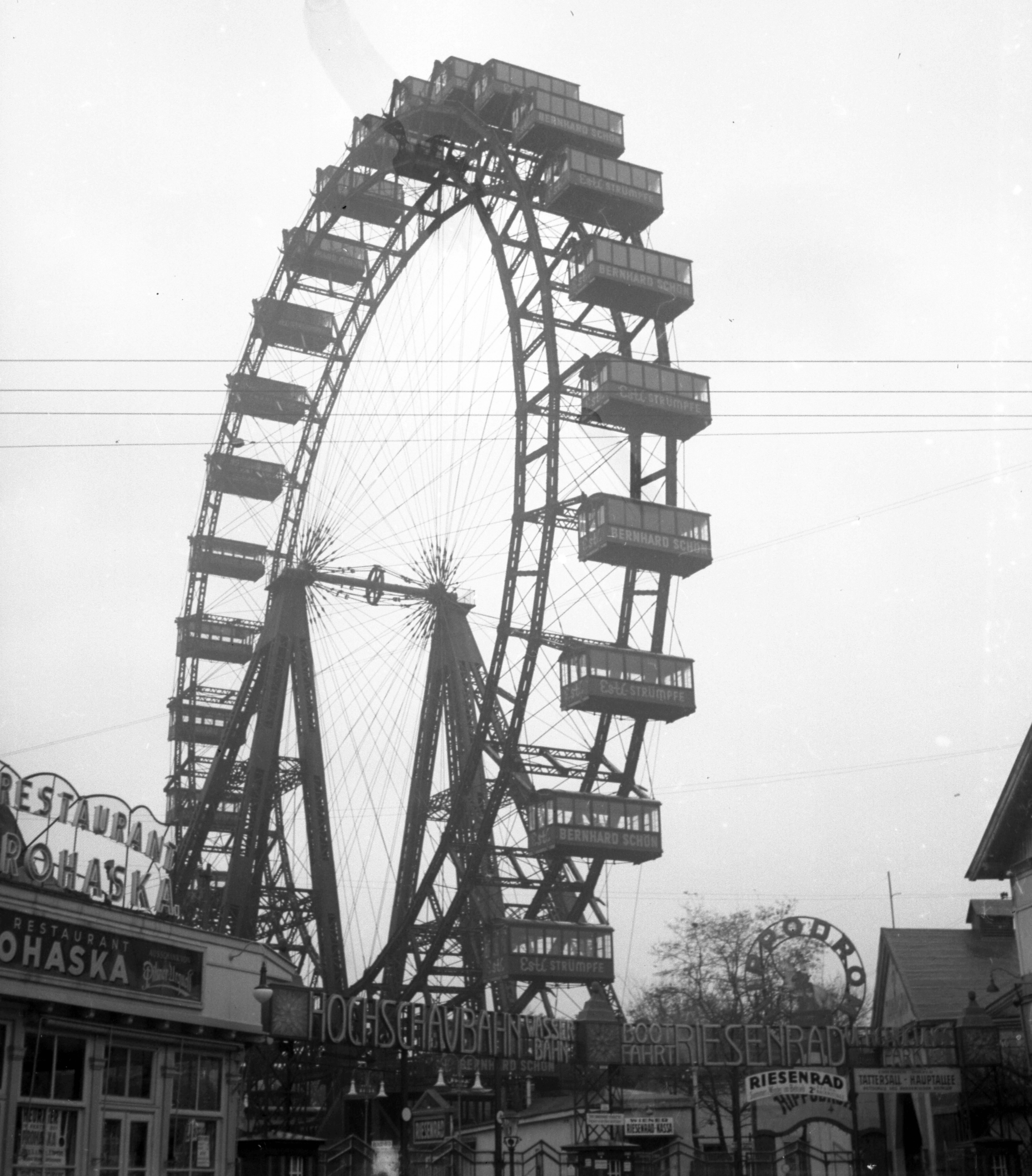 Práter. Location: Austria, Vienna Tags: amusement park, Ferris wheel, label Title: Práter.